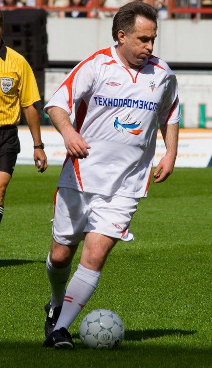 Vitaly Mutko